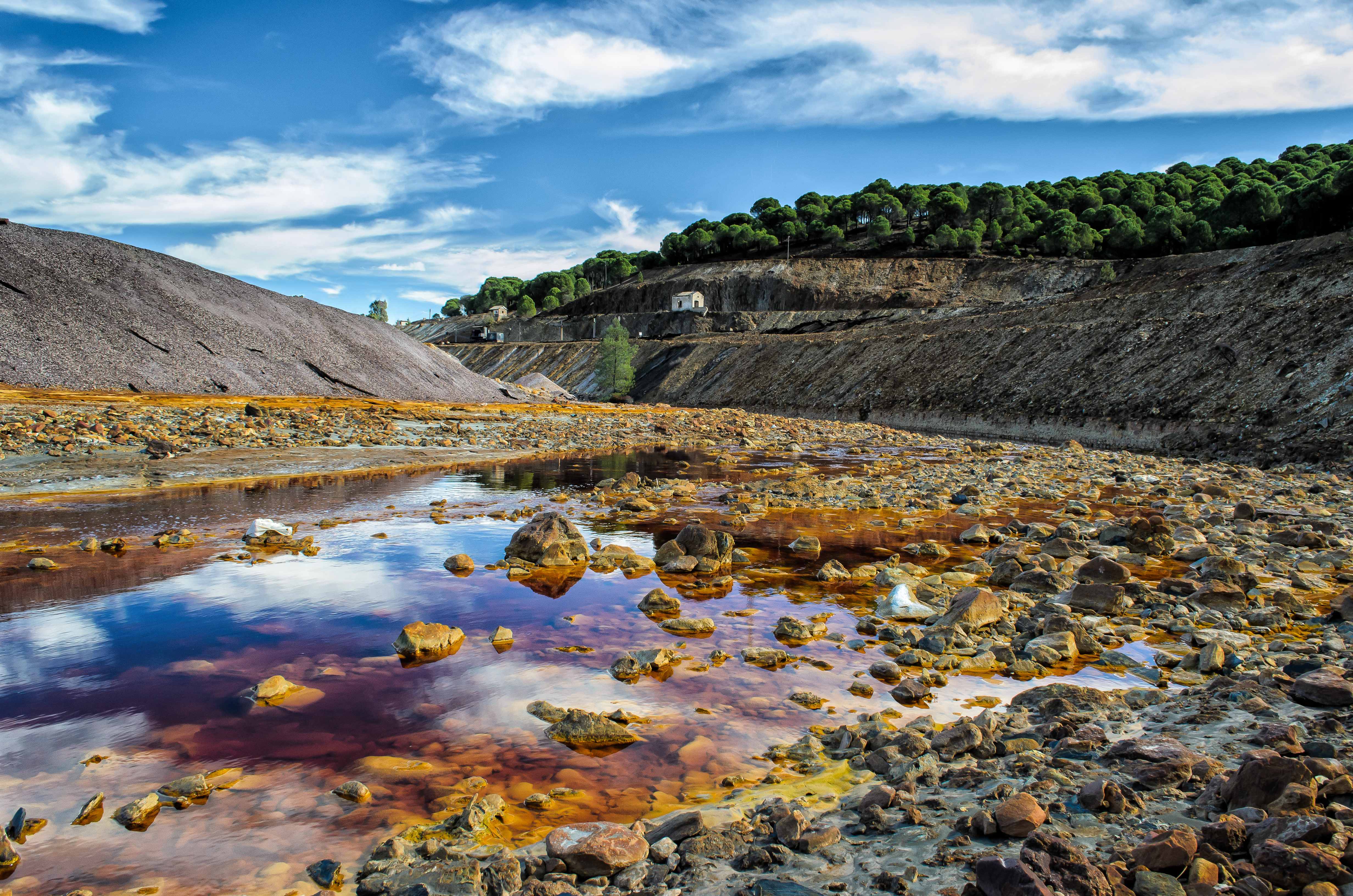 Paisaje de las Minas de Río Tinto.